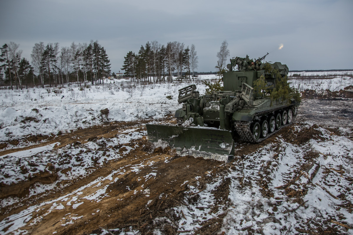 В Мулино сапёры-штурмовики 1-й гвардейской инженерно-сапёрной бригады отработали действия по проделыванию проходов в минных полях.